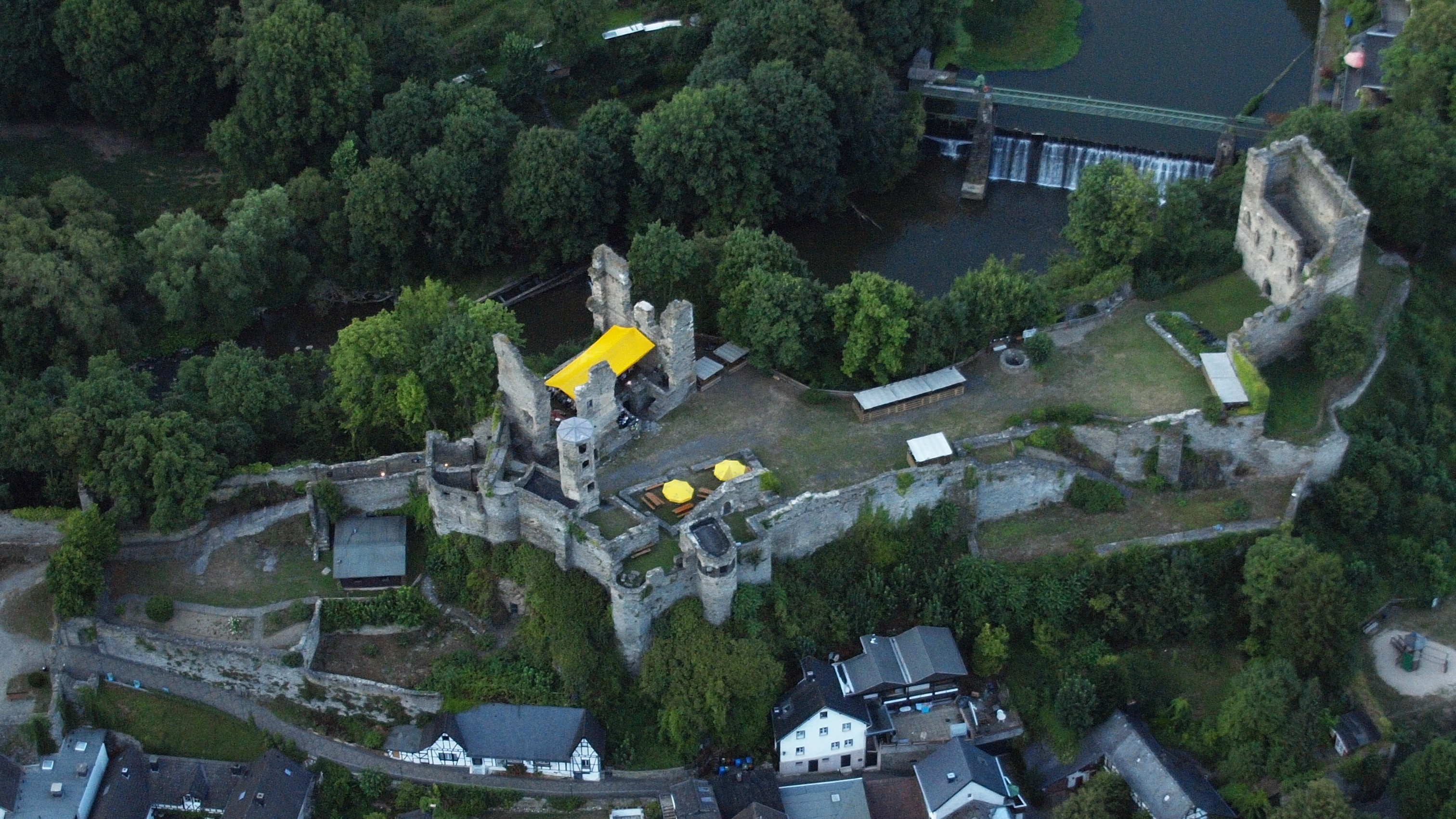 Burg Altwied: Luftaufnahme